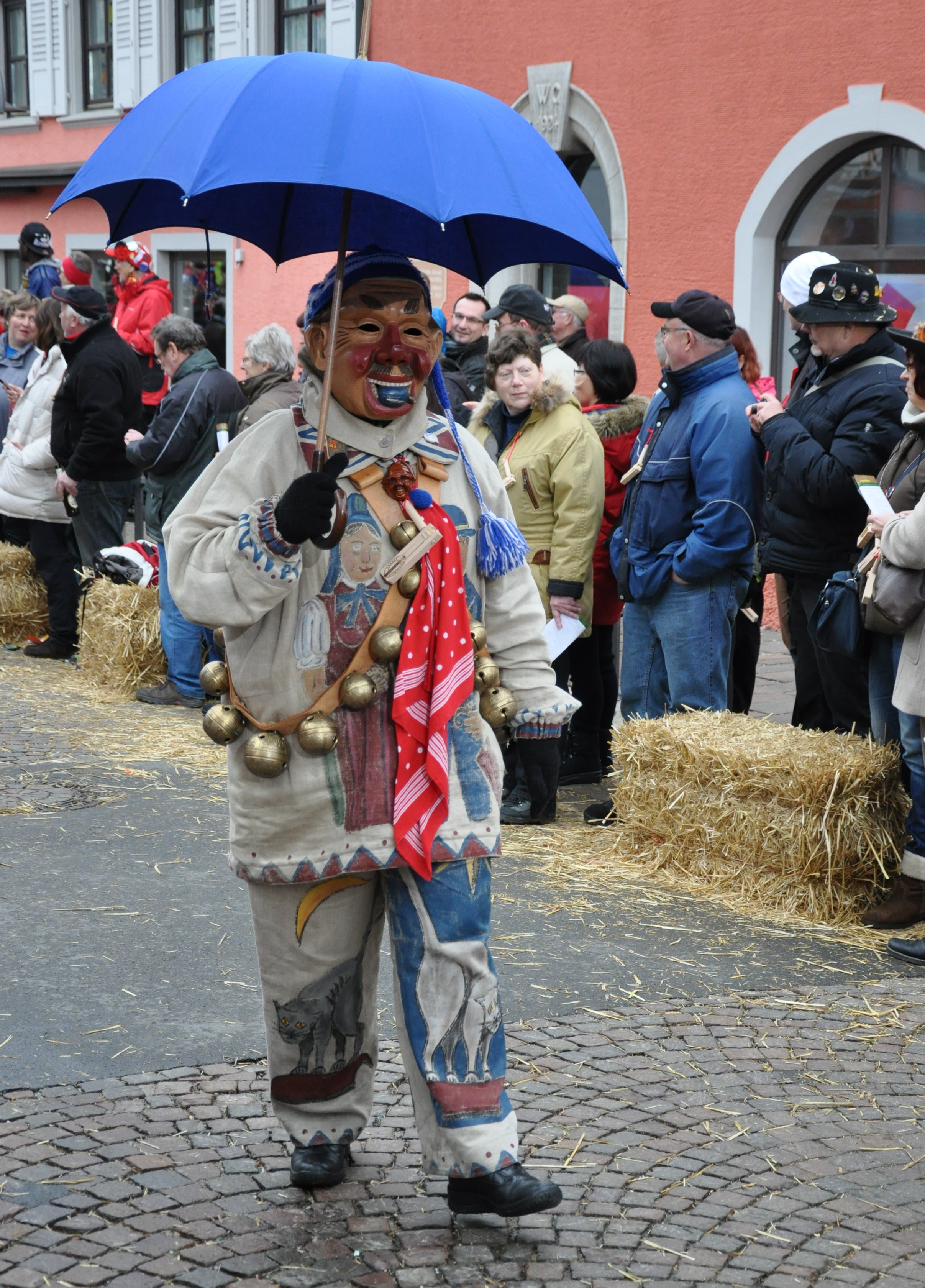 Plfumeschlucker Bonndorf e. V.; Narrenfigur: Pflumeschlucker Fotografiert beim Landschaftstreffen der Vereinigung Schwäbisch-Alemannischer Narrenzünfte (VSAN) 2014 in Tettnang; Narrensprung am Sonntag, 16. Februar 2014